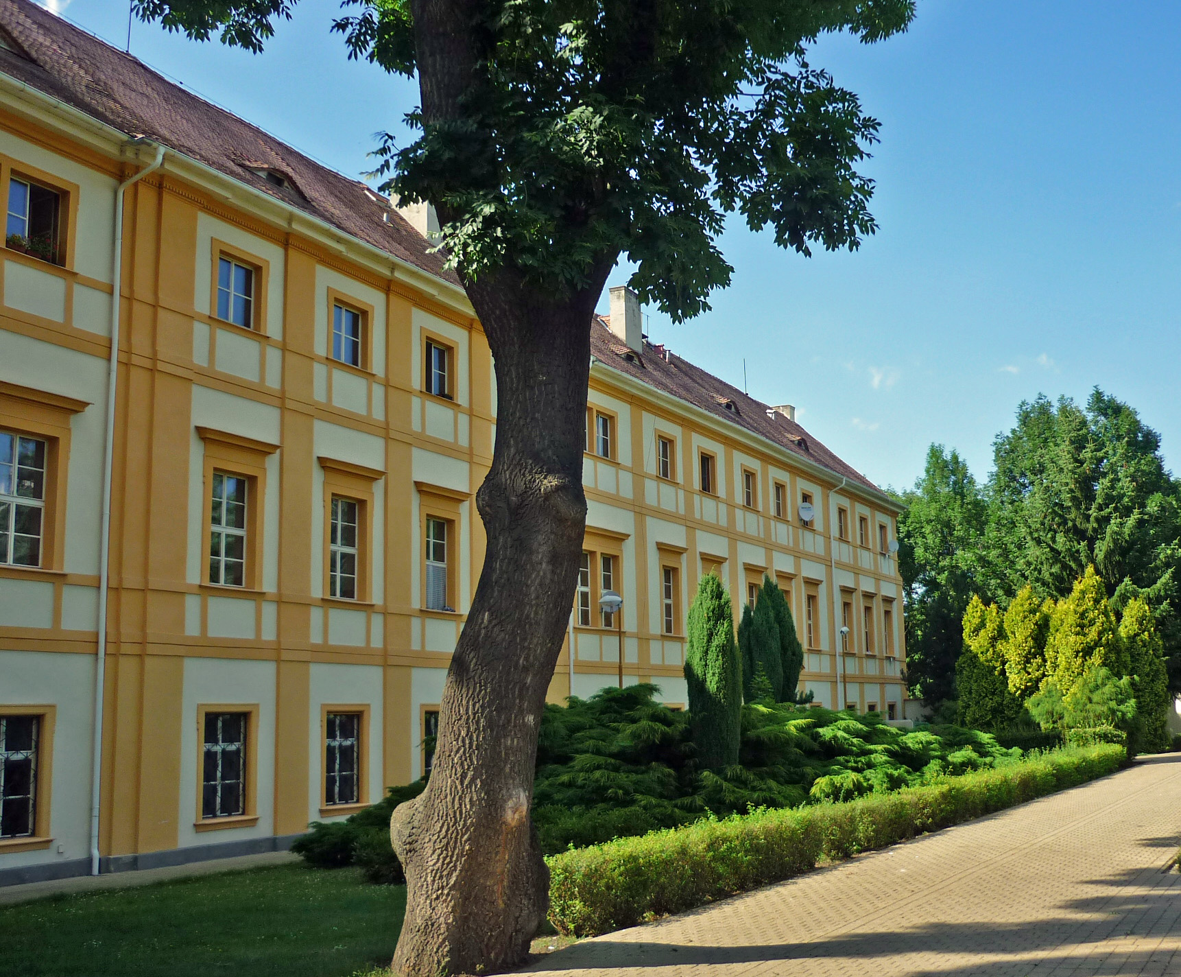 Schloss Schwaz / Světec in Böhmen